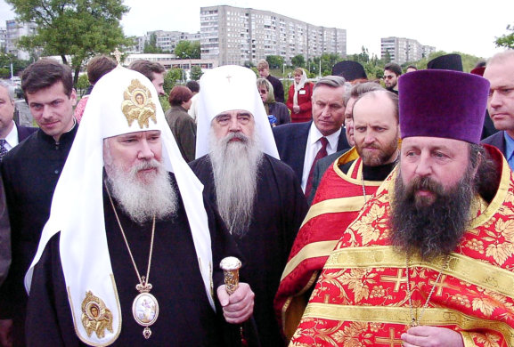 Святейший Патриарх Алексий II во время своего визита в приход. Май 2002 года.